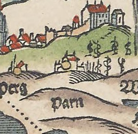 Ausschnitt aus Tafel 14 der Bairischen Landtafeln von Philipp Apian (1568)